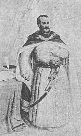 Беларуская (тарашкевіца): Партрэт Яна Хадкевіча (Jan Chadkievič)